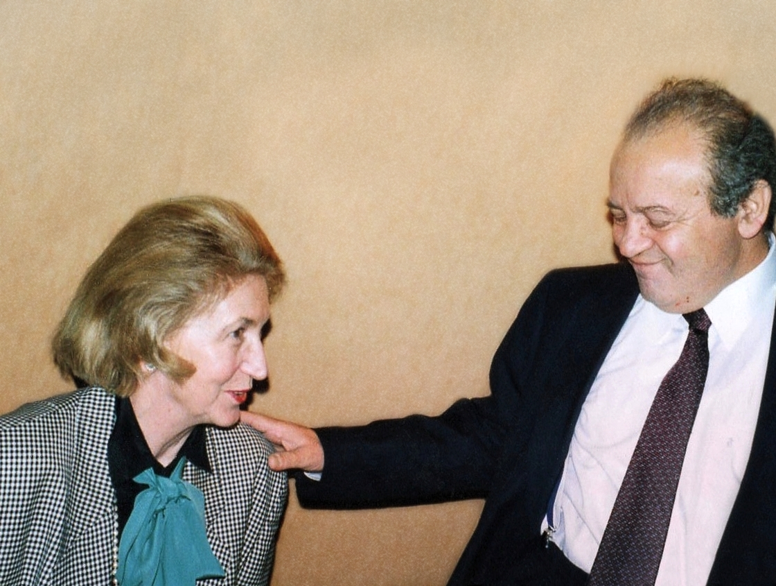 Gabriel Laub, Schriftsteller und Satiriker in Hamburg mit Rosmarie Fiedler-Winter von der Hamburger Autorenvereinigung